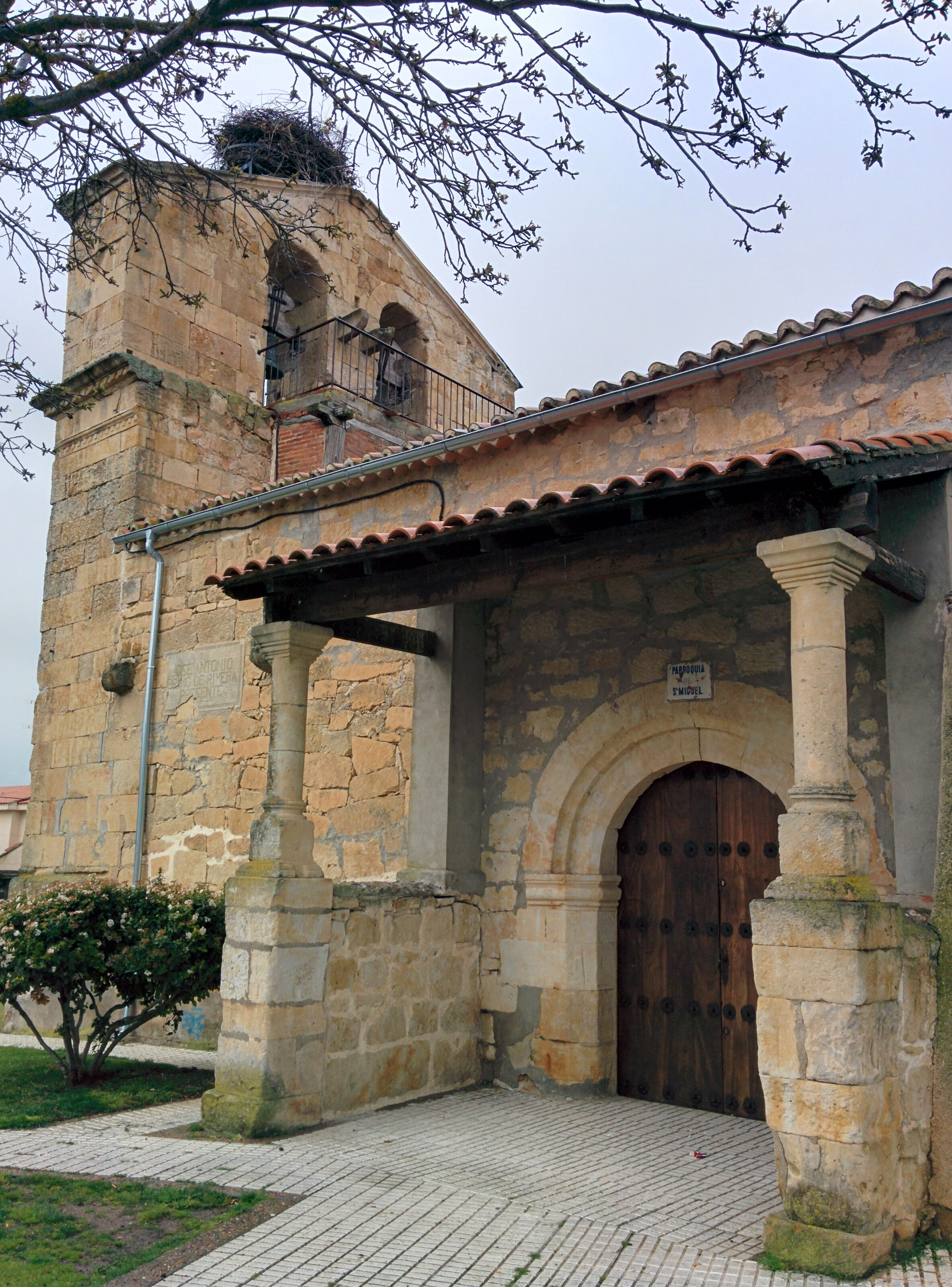 Iglesia de San Miguel Arcángel, en Monterrubio de Armuña (Salamanca, España).